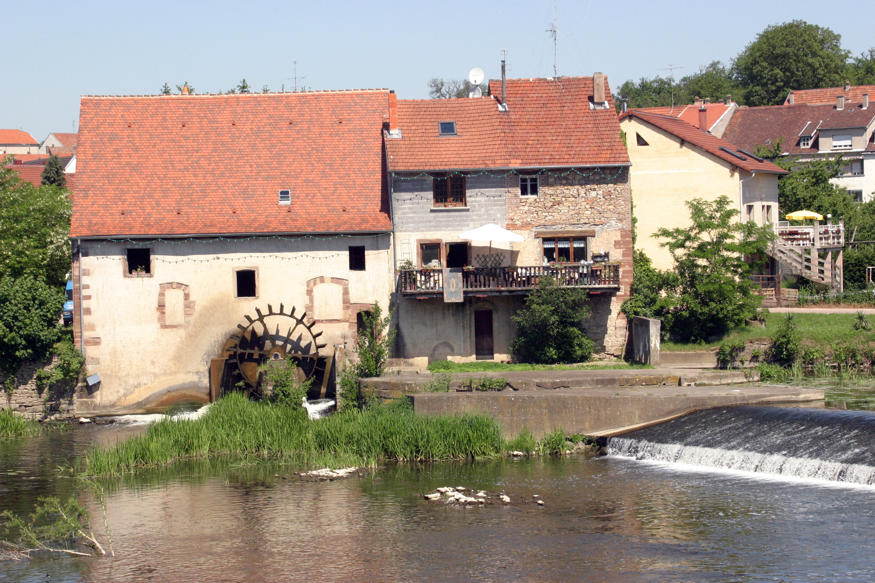 Sarreinsming